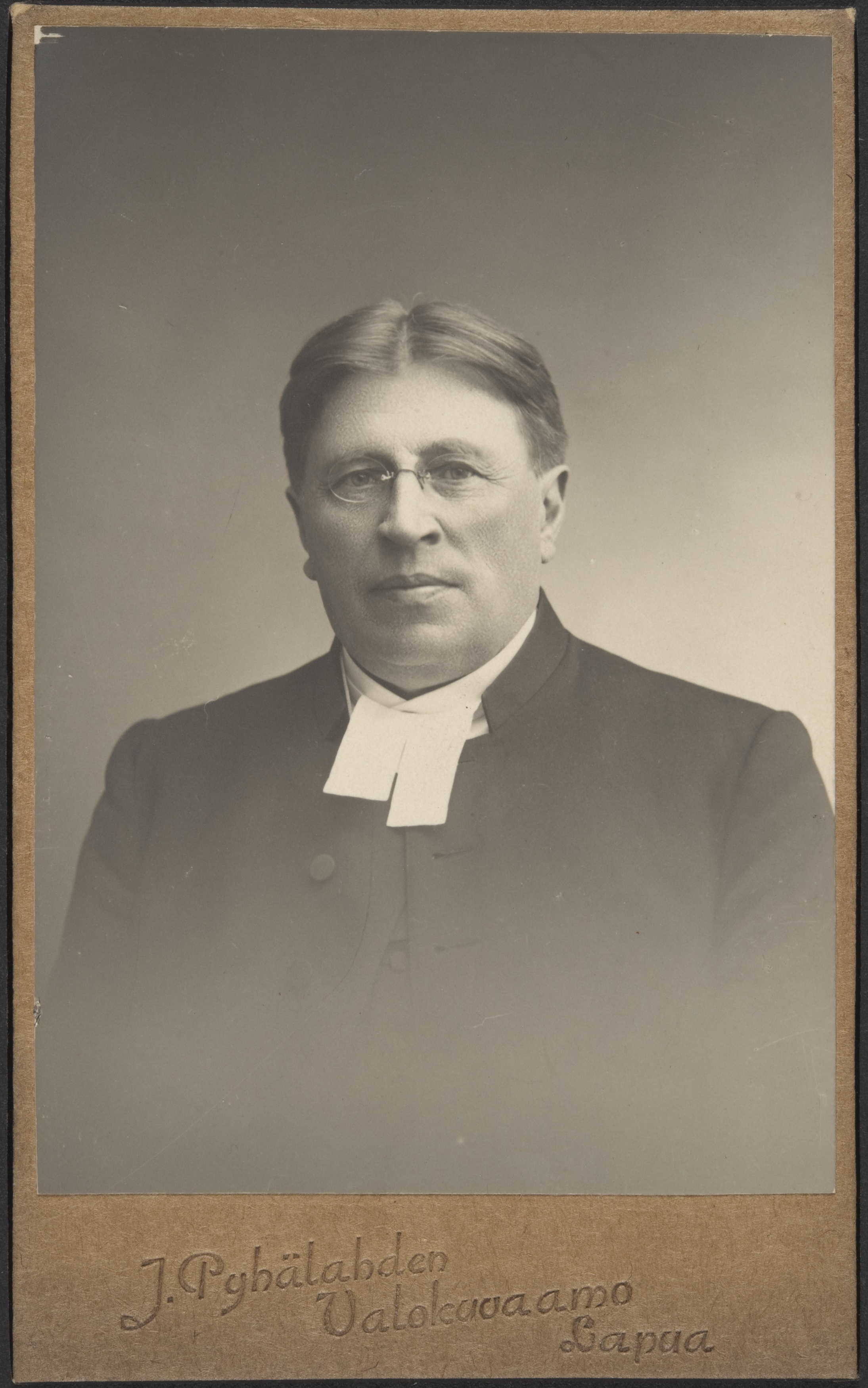 Suomalainen rovasti Wilhelmi Malmivaara (1854-1922).